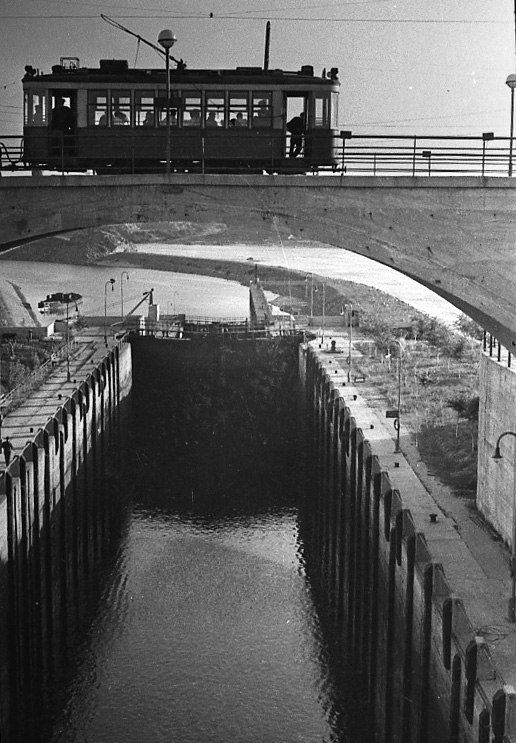 Трамвайний вагон Х рухається мостом над шлюзом Дніпровської ГЕС